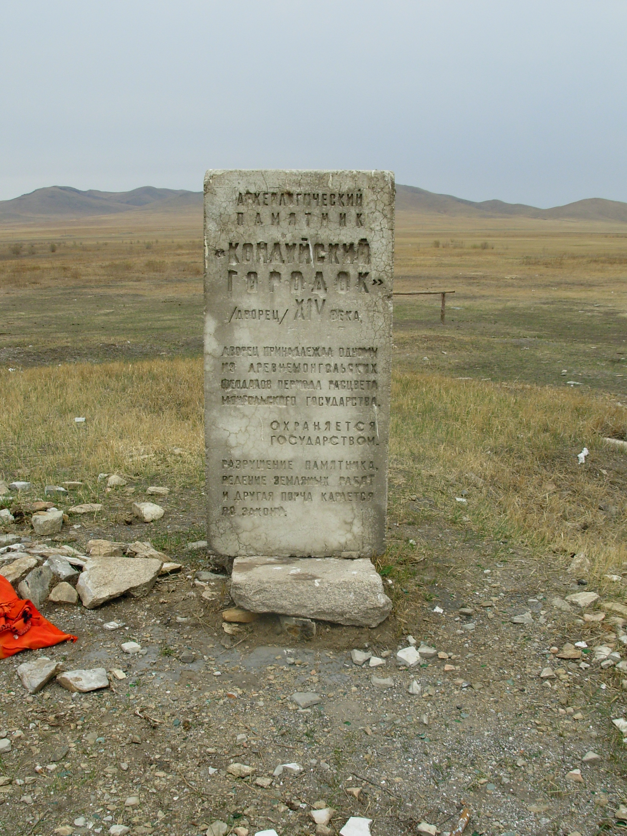 Памятная плита